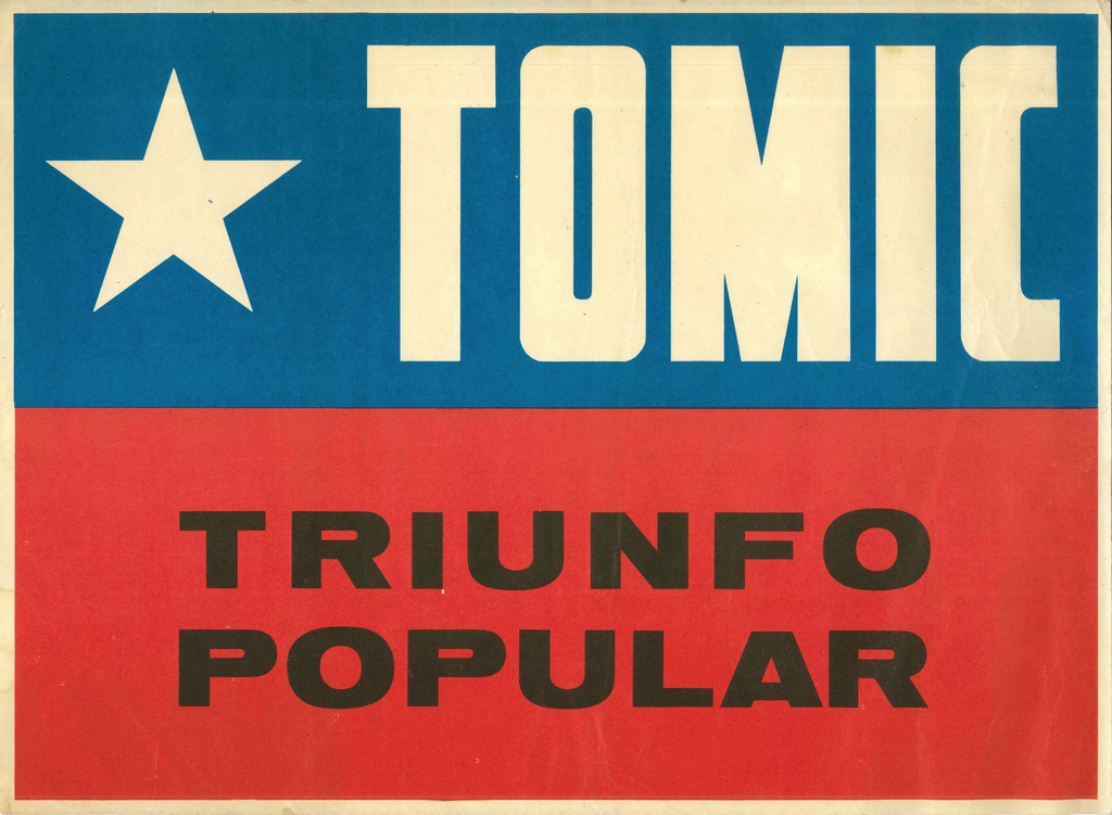 Chile 1970: Poster que pide votar por Radomiro Tomic.